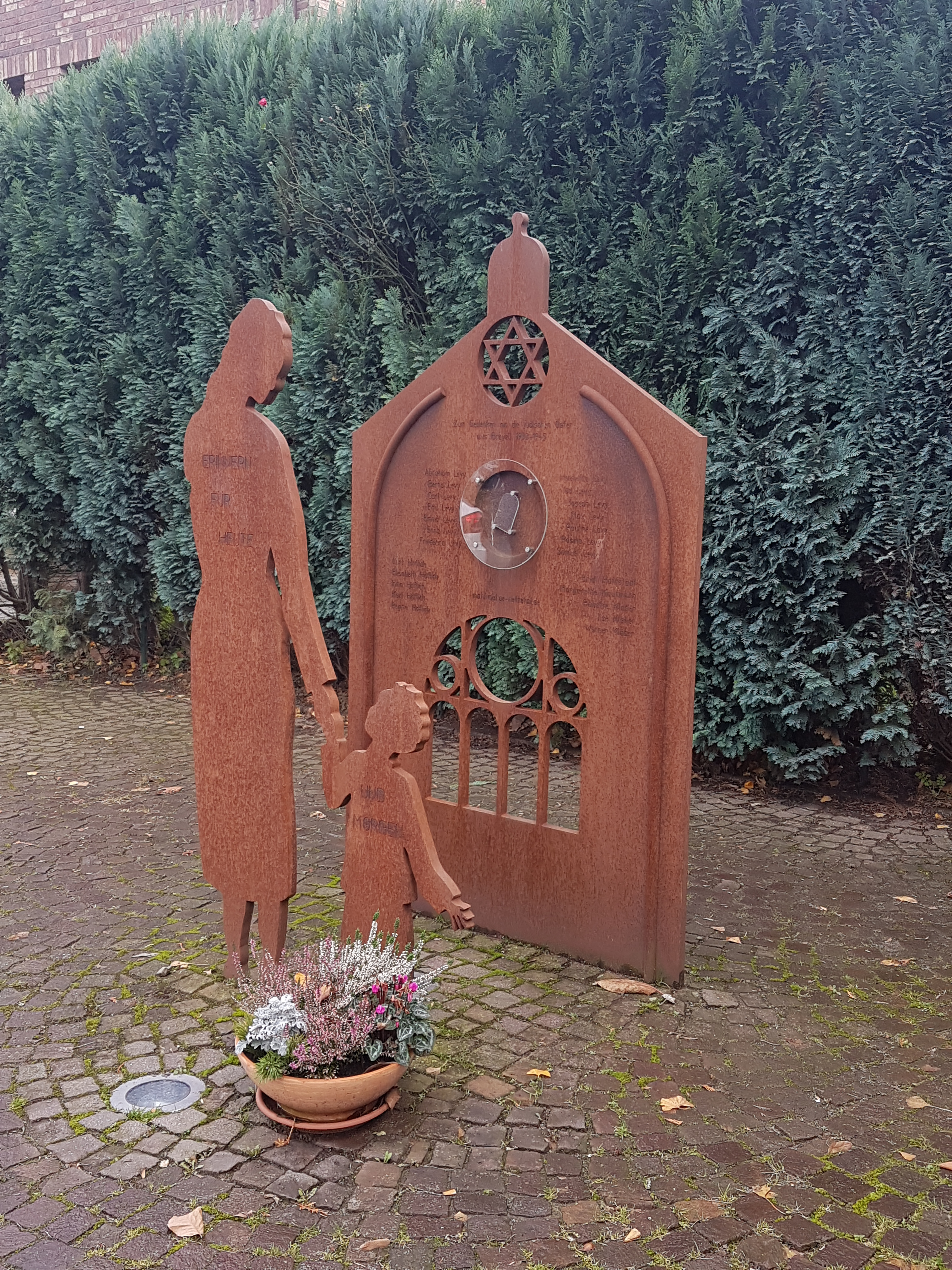 das Mahnmal in Breyell, Biether Straße, wurde 2013 eingeweiht. Es erinnert an die dort bis 1938 stehende Synagoge und an 20 Bürger Breyells, die im Holocaust ermordet wurden.